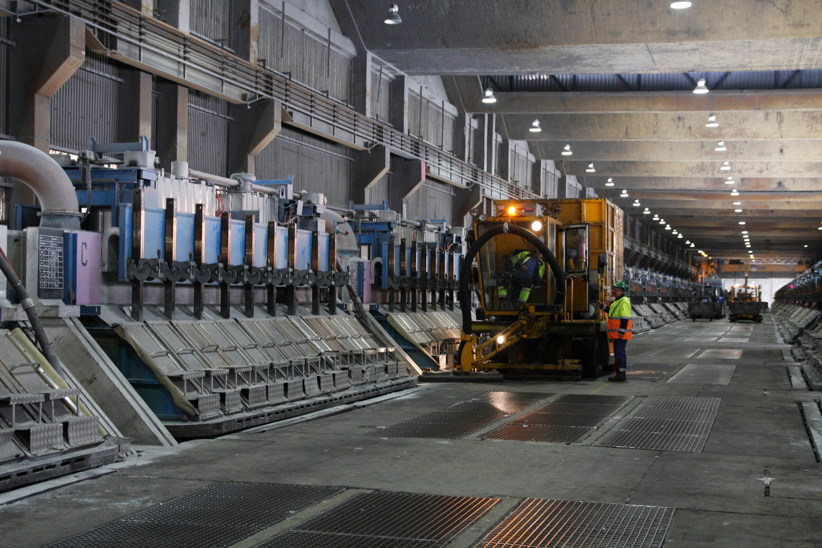 ovnshall aluminium i Mojøen